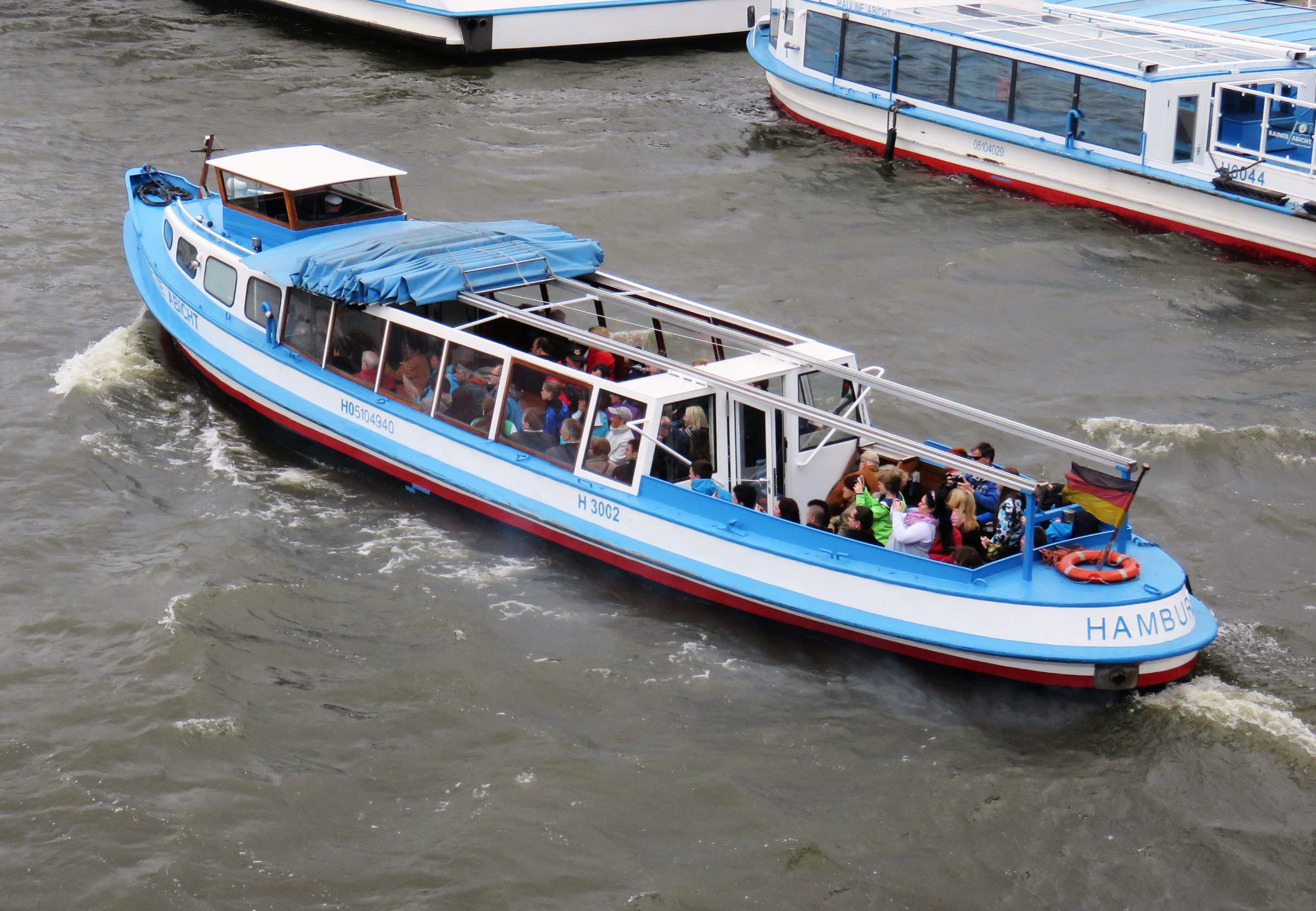 Hamburger Hafenbarkasse Jette Abicht im Niederhafen